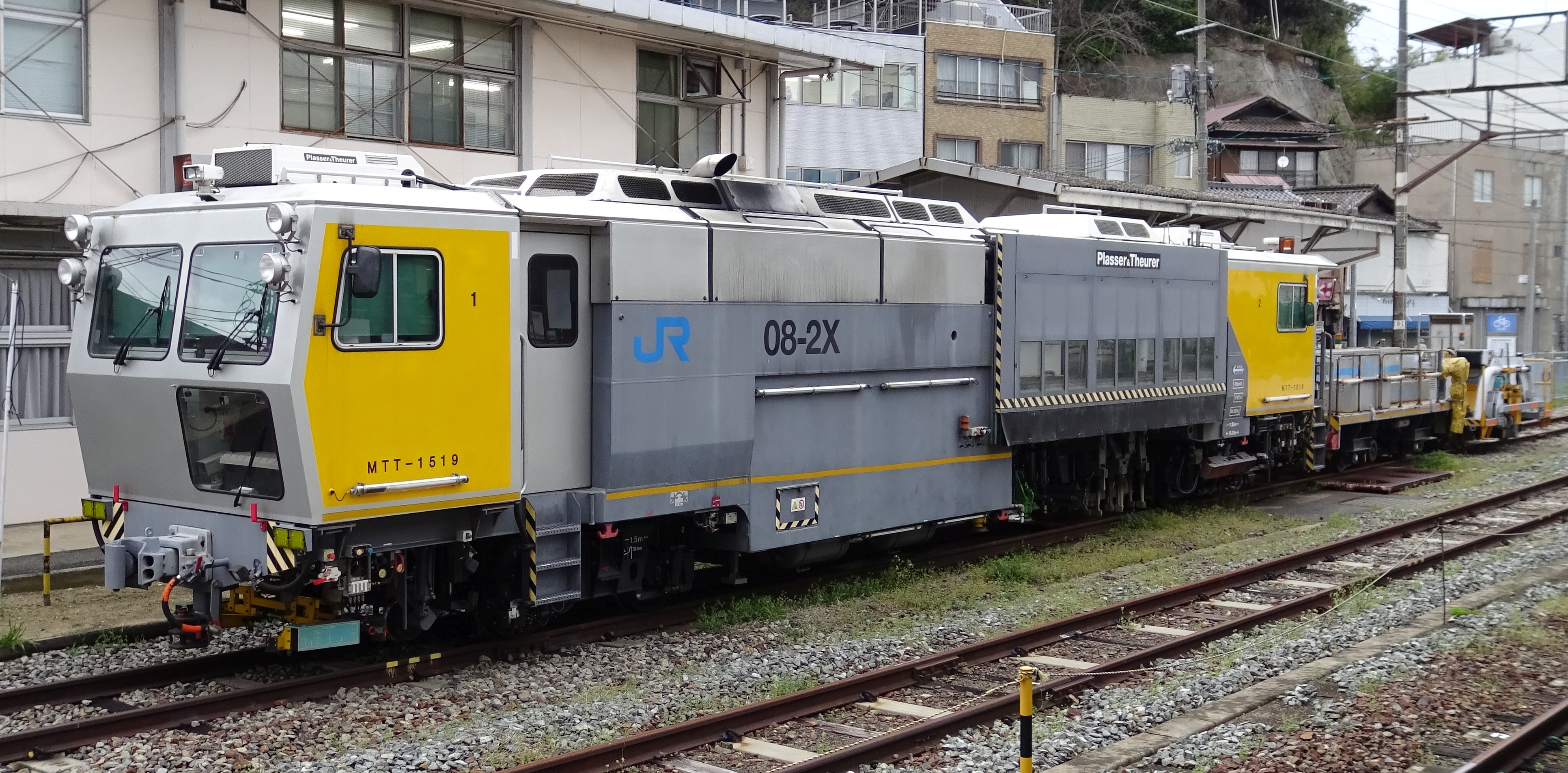 プラッサー&トイラー マルチプルタイタンパー 「08-2X」 （JR西日本、尾道駅）